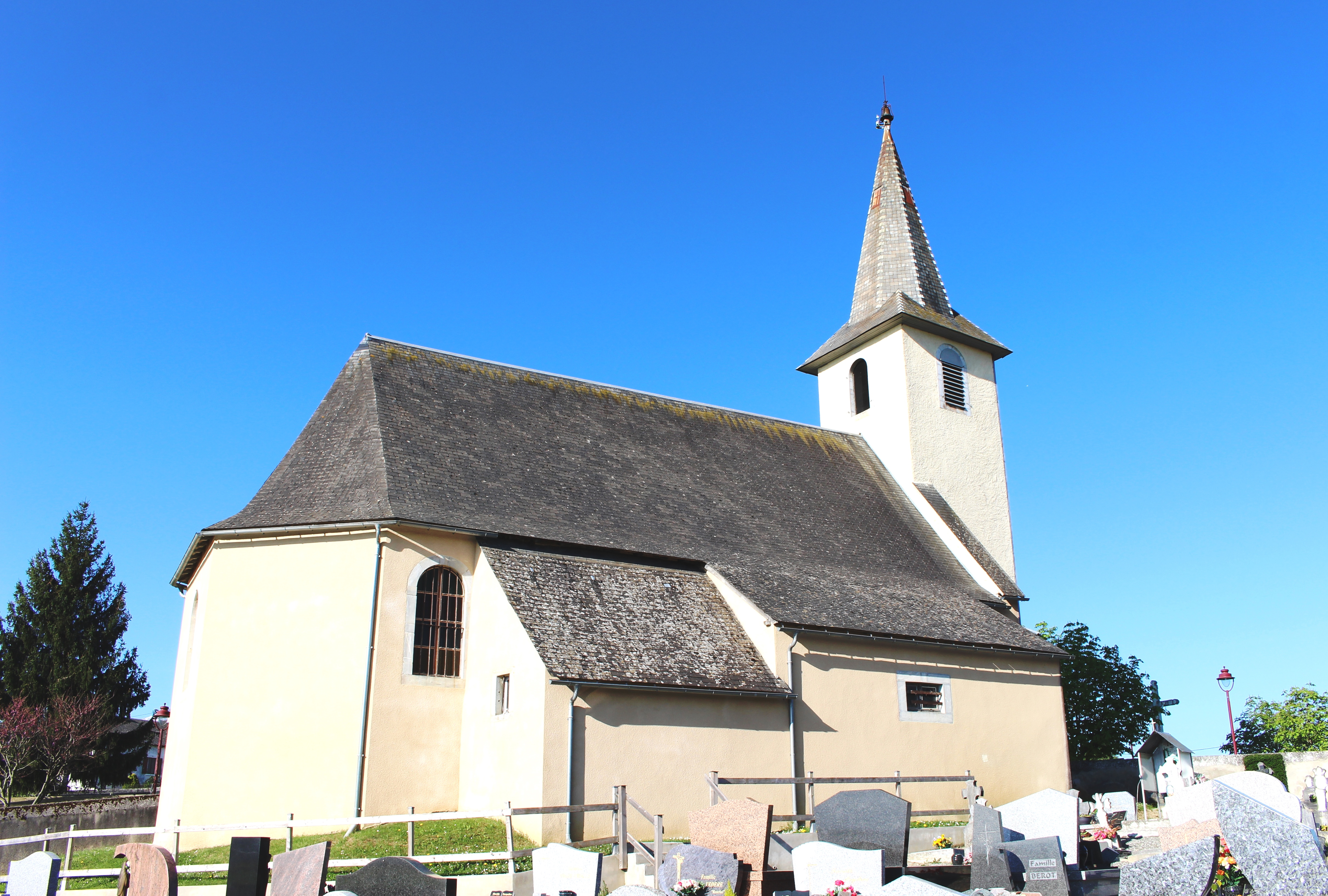 Église Sainte-Barbe de Mérilheu (Hautes-Pyrénées)